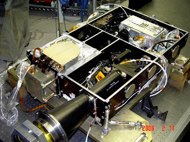 Solar Dynamics Observatory, Helioseismic and Magnetic Imager instrument